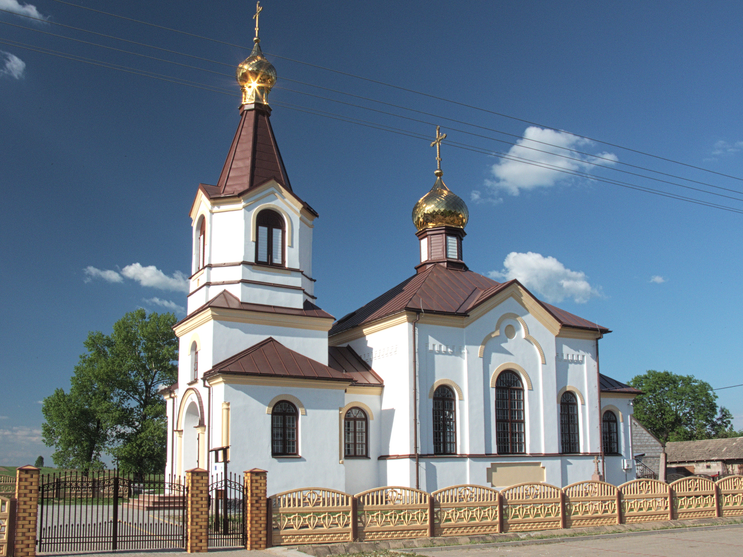 Cerkiew pod wezwaniem Podwyższenia Krzyża Świętego w Andryjankach.